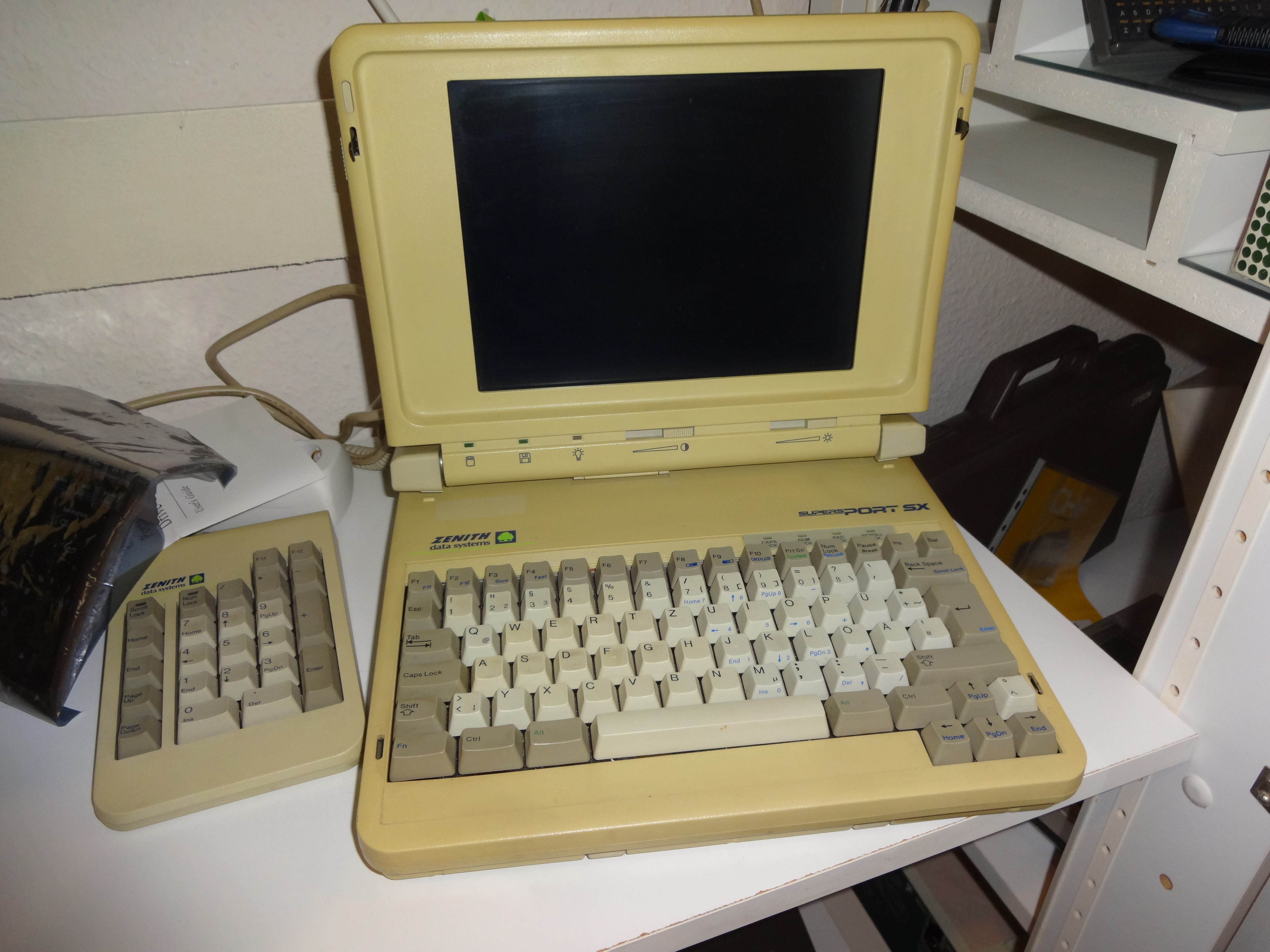 Laptop supersPORT sx der Marke Zenith Data Systems